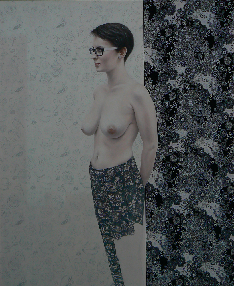 Martin Velíšek, Renata, 2016, olej na desce, 160 x 130 cm